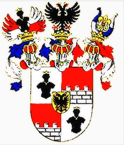 Erb Morzinů